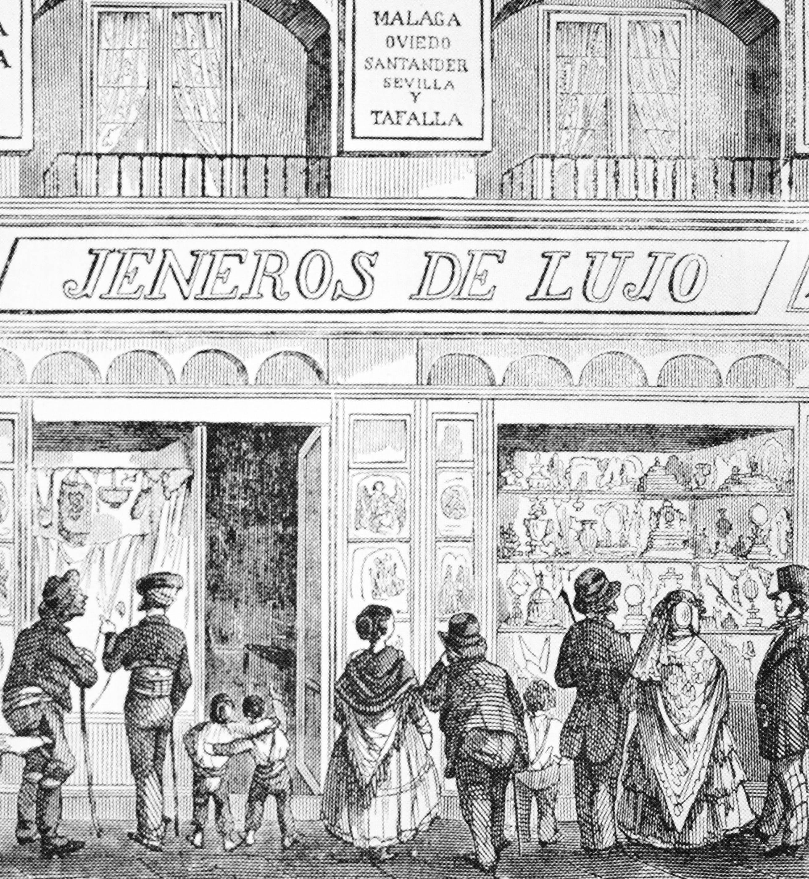 Grabado-ilustración del comercio de Madrid en la segunda mitad del siglo XIX).